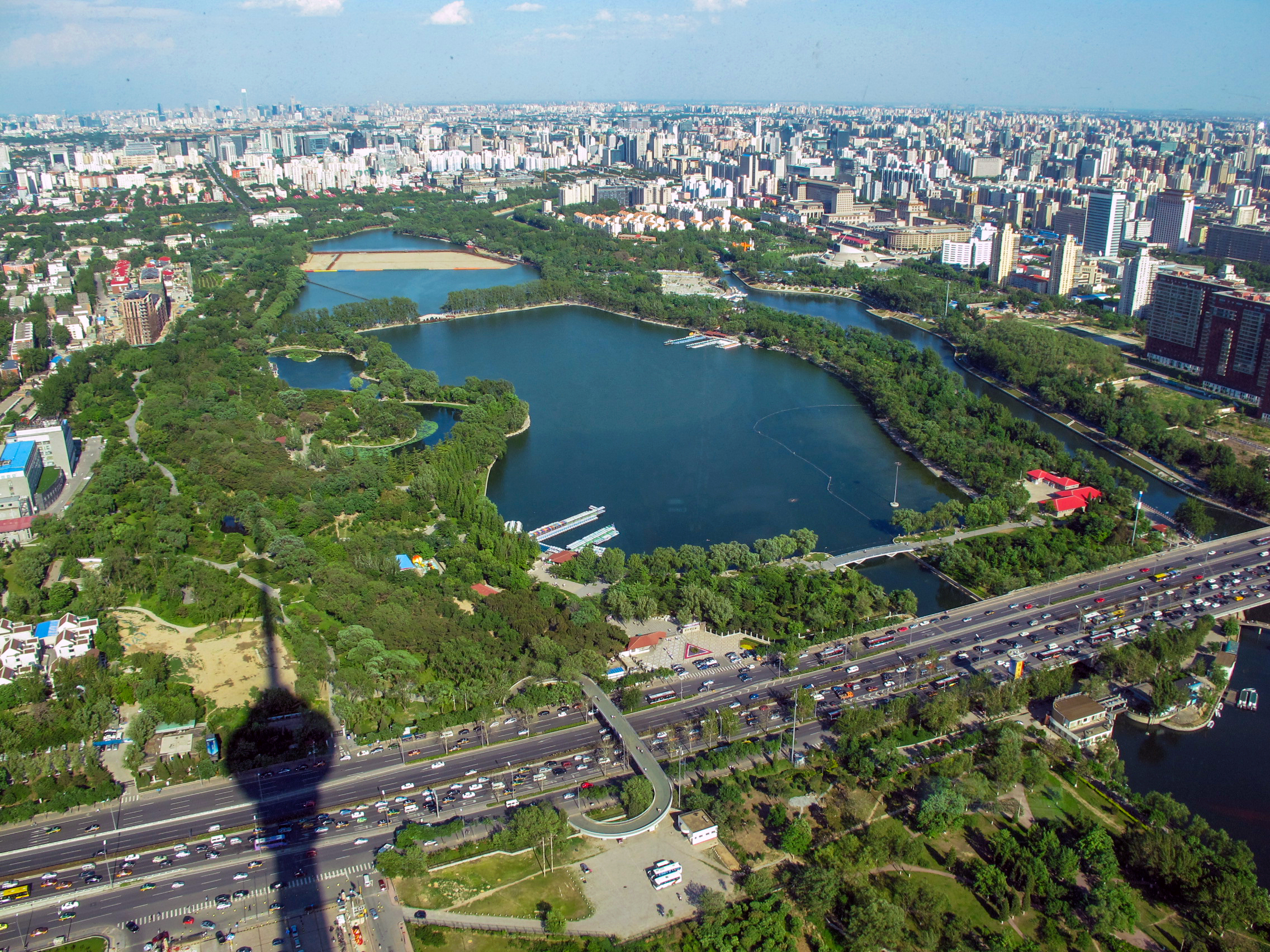 Yuyuantan Park